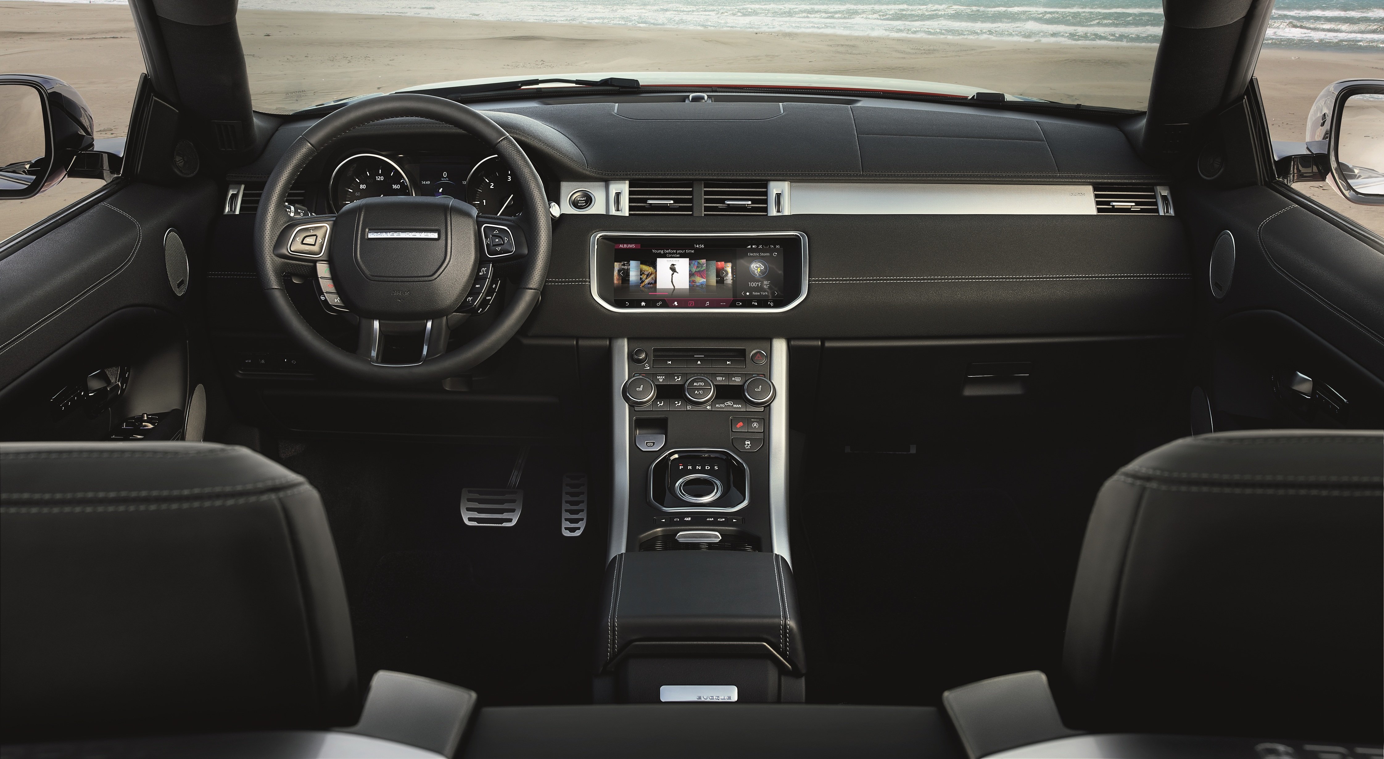 RR_Evoque_Convertible_int_cabin (7)